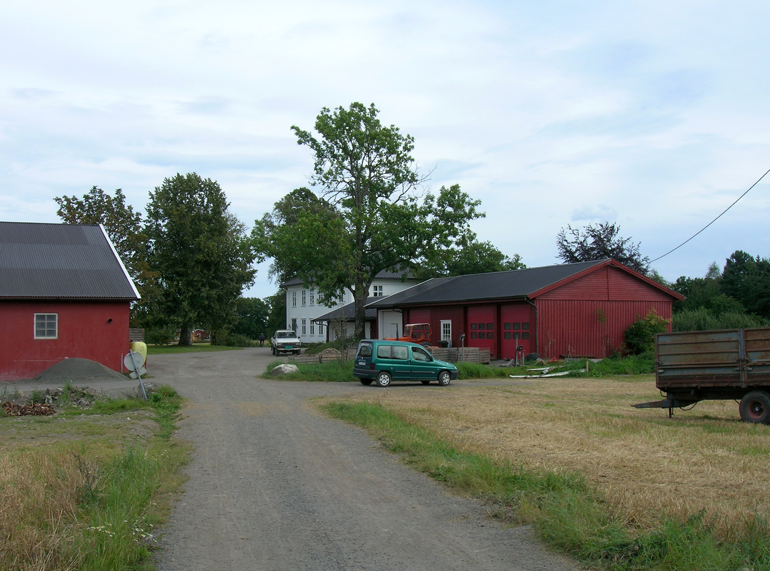 Prestegården på Nøtterøy i Vestfold i Norge